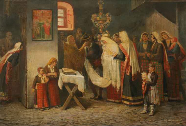 Иван Мърквичка. „Сватба в Момчиловци“